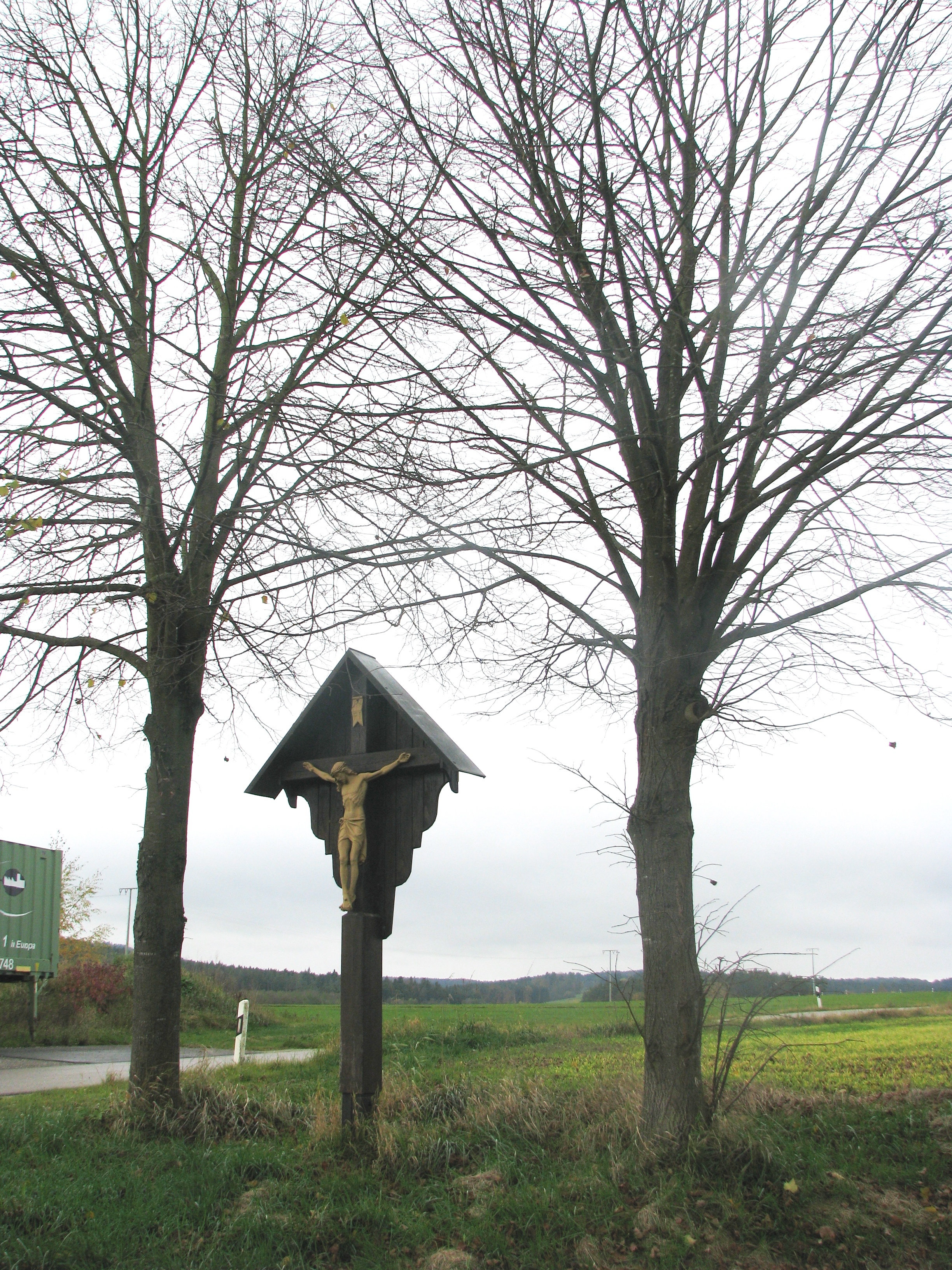 Kettenbach, Ortsteil von Berg bei Neumarkt in der Oberpfalz, Kreuz beim Dorf